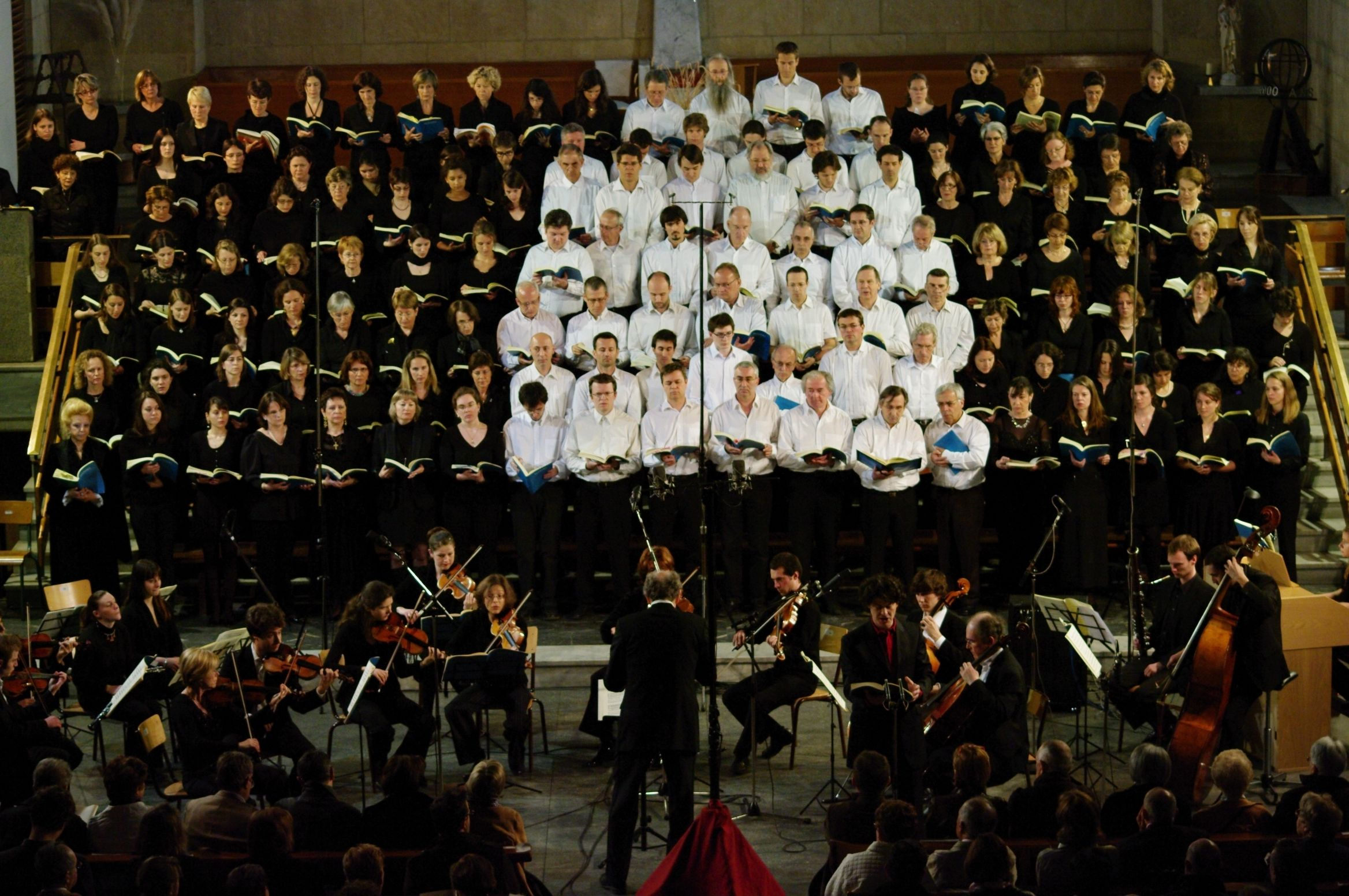 Photo du chœur de l’École normale supérieure de Lyon et de la Sprezzatura de Paris produisant Le Messie de Haendel en L'église Notre Dame de l'Annonciation de Vaise (Lyon 9e) le 9 mai 2009.